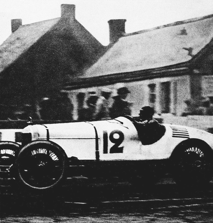 Jimmy Murphy vainqueur du GP de l'A.C.F. 1921 au Mans, sur Duesenberg.